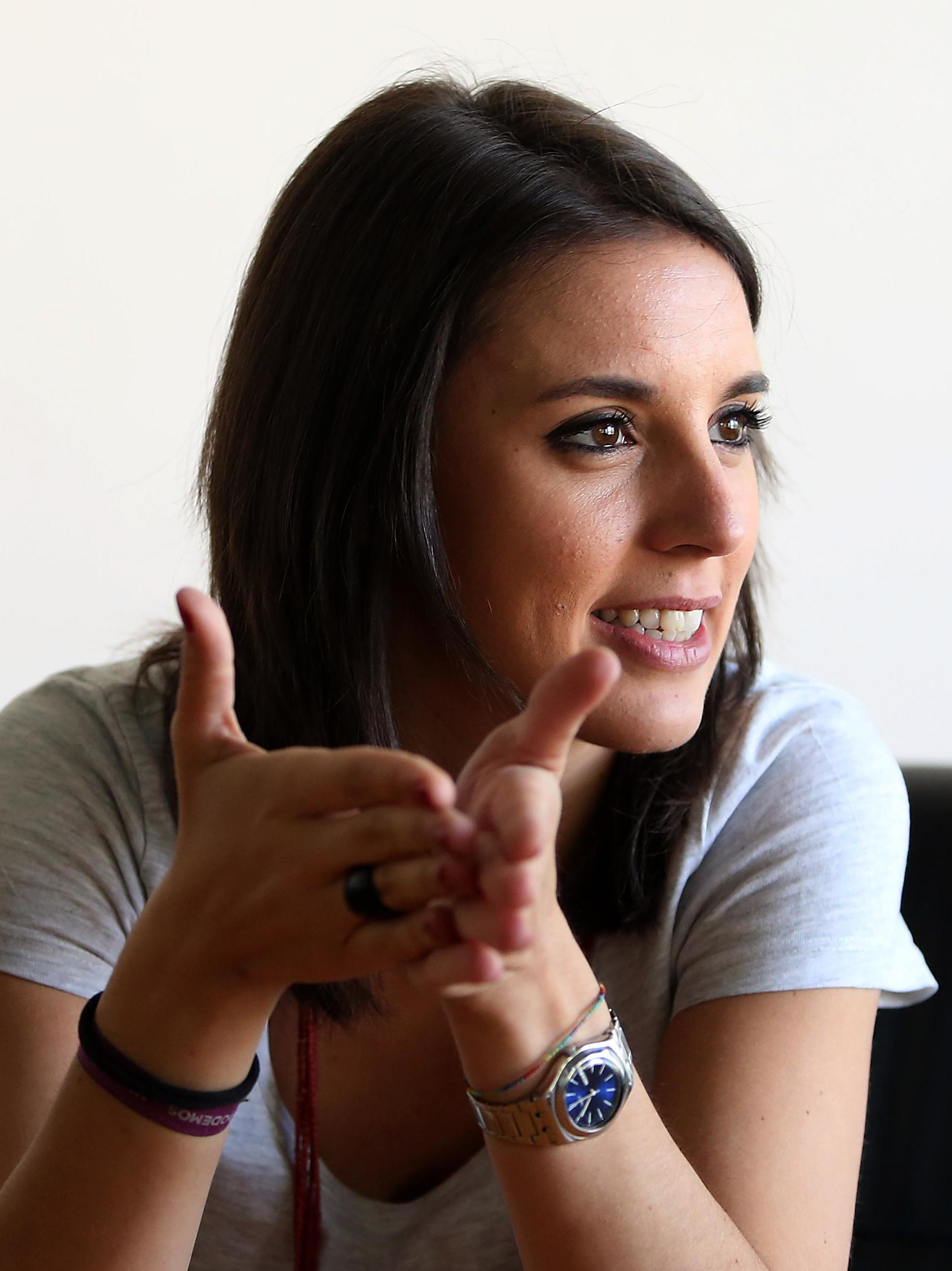 La APM ha emitido un comunicado, en respuesta a la petición de amparo de un grupo de periodistas, en el que exige a Podemos que deje su "campaña de acoso a informadores" cuando está en desacuerdo con las publicaciones. La Asociación señala que tienen "pruebas documentales", pero no las aporta. La portavoz de Podemos ha respondido que esperará "a ver en qué se concreta" y ha criticado que no contactasen con ellos antes de hacerlo público